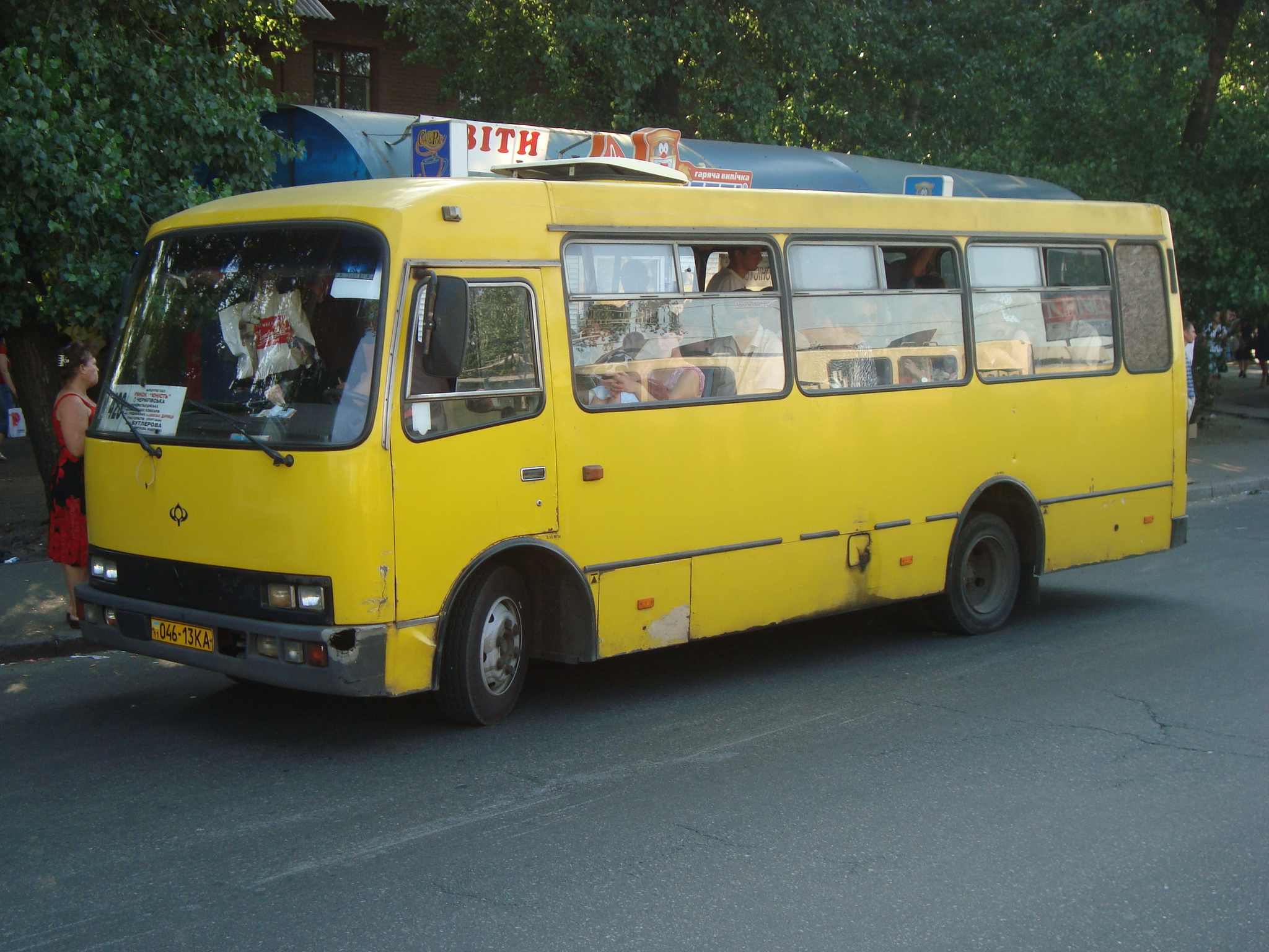 Маршрутка у Києві біля станції метро Чернігівська.